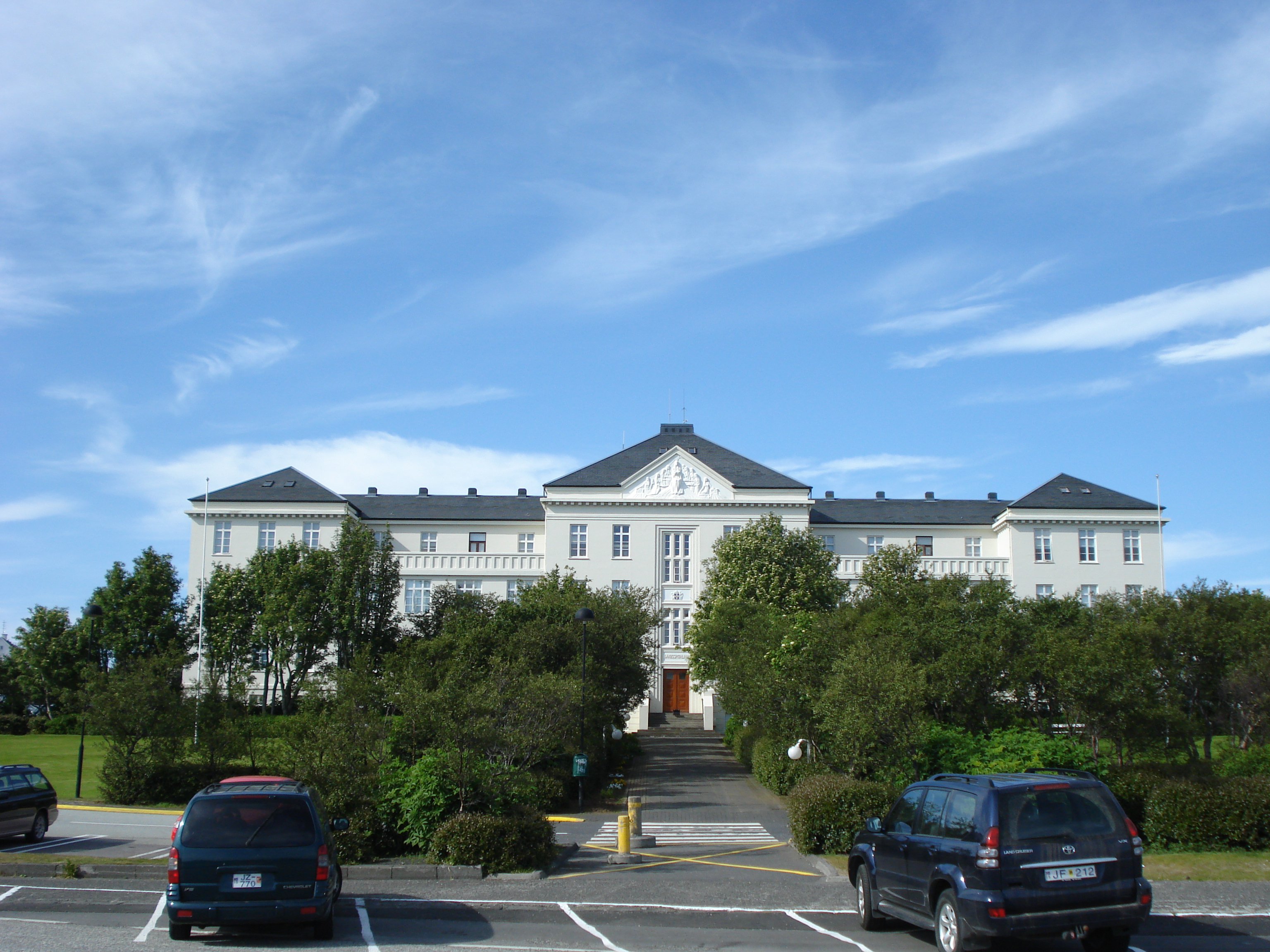 Ríkisspítalar (Landspítalinn)